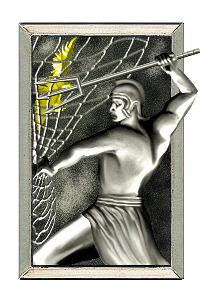 L'insigne figure un gladiateur armé d'un filet et d'un trident symbolisant les moyens de surveillance et d'identification de la défense aérienne, ainsi que ses moyens d'interception et de destruction sur un vecteur aérien inconnu.